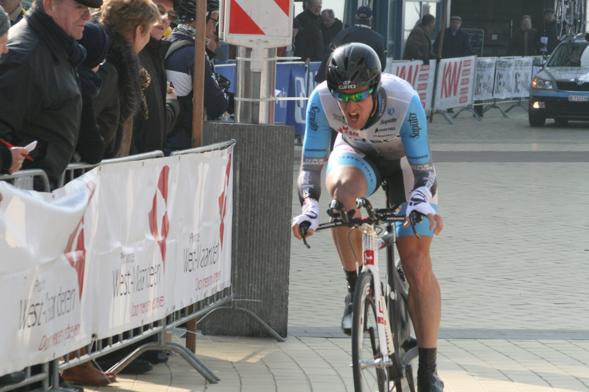 Driedaagse van West-Vlaanderen 2011, proloog in Middelkerke